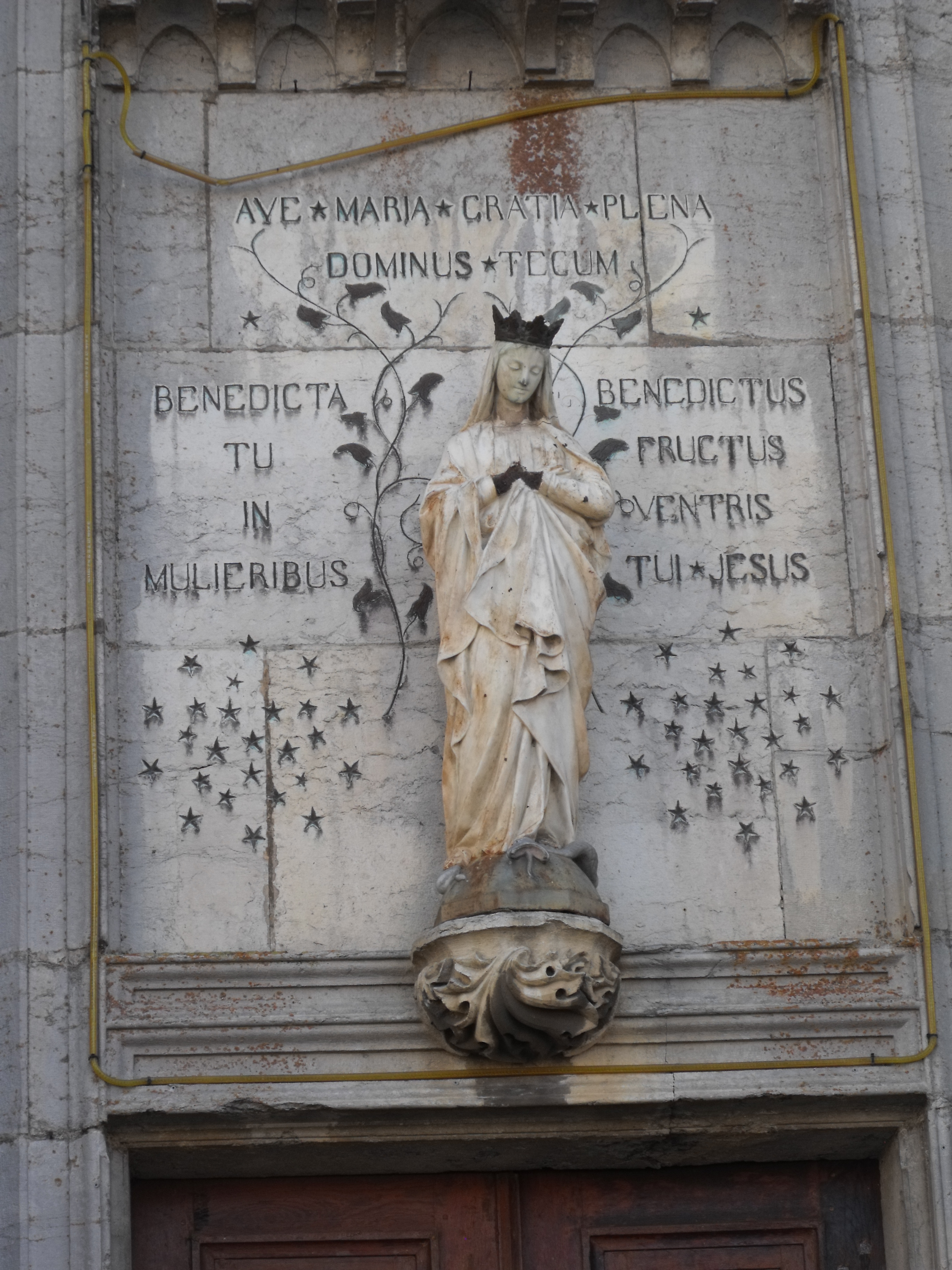 Eglise de l'assomption d'Anteuil, Doubs, France